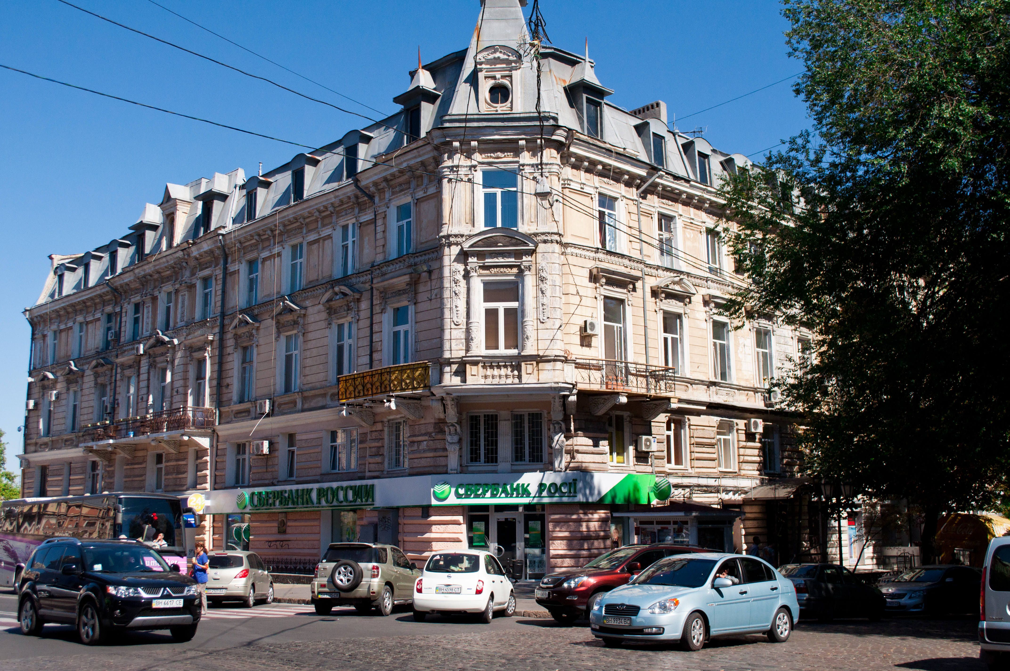 Будинок Страхового товариства “Росія”, у якому жив М.В. Замечек - архітектор